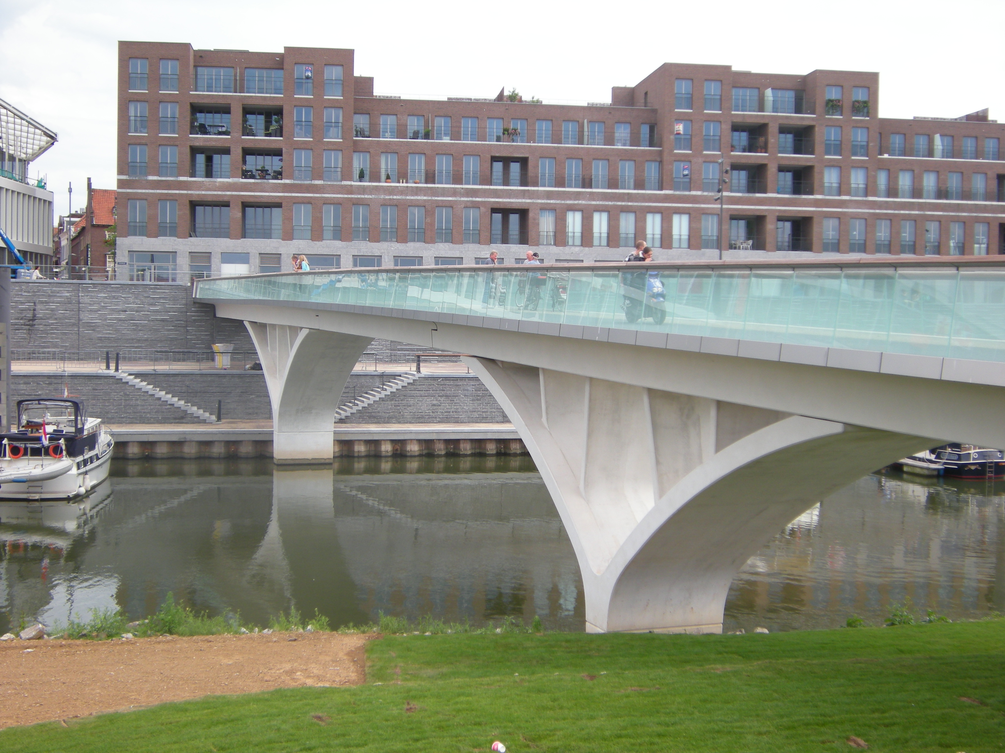 Weerdsprong vanaf schiereiland de Weerd